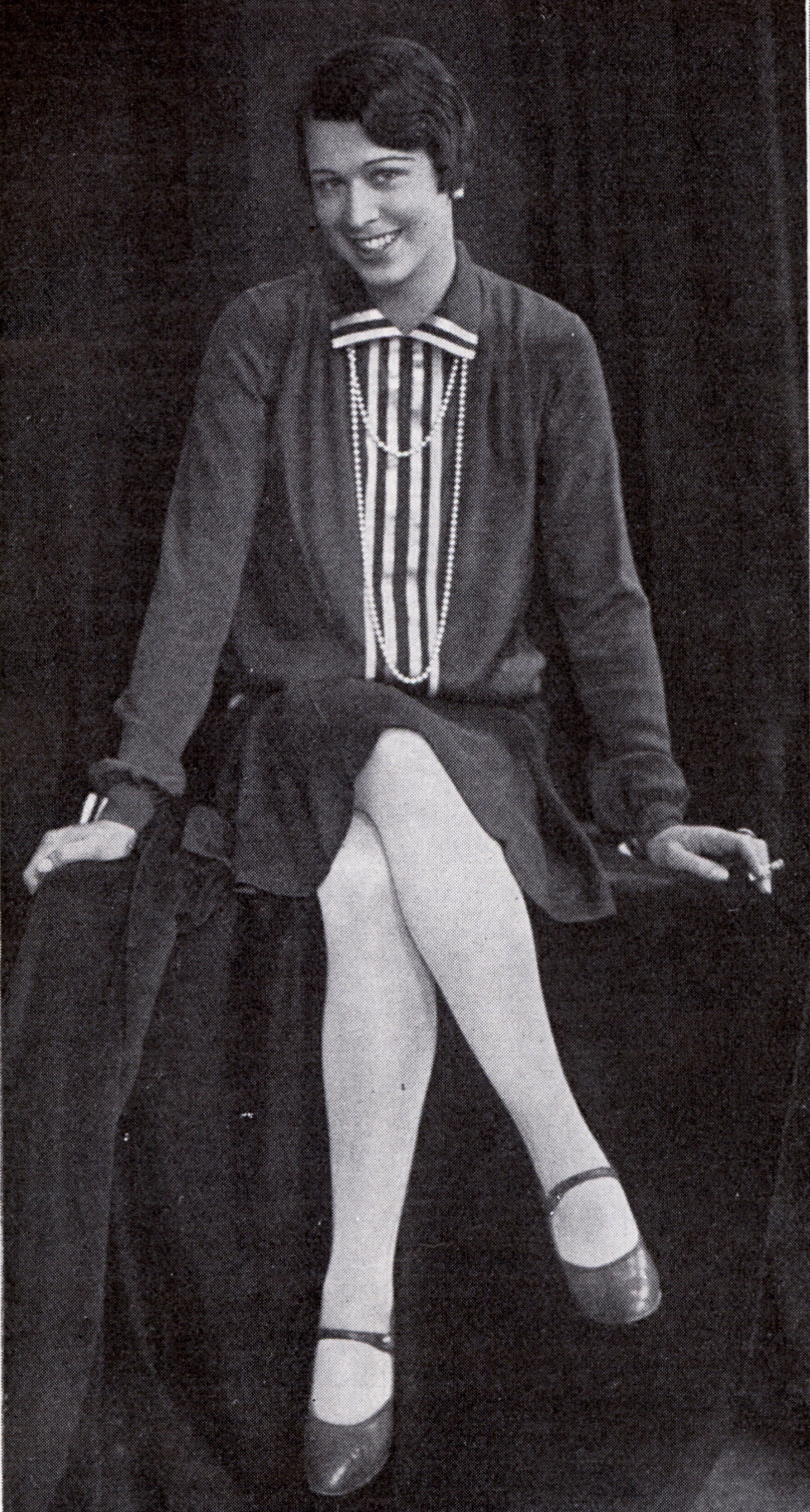 Elsa Burnett (1902-1999). Foto i Scenen 1927.